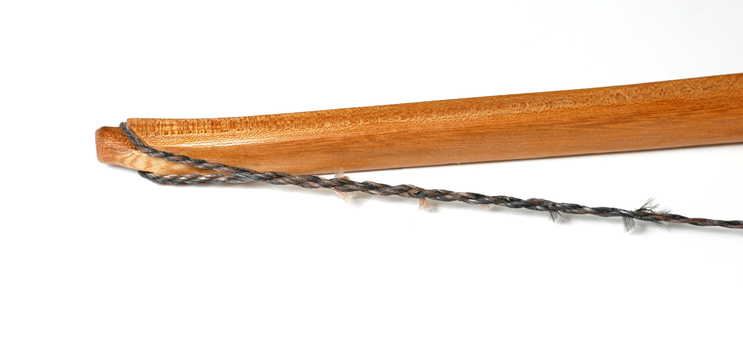 Flämischer Spleiss auf einem Englischen Langbogen aus Ulme.